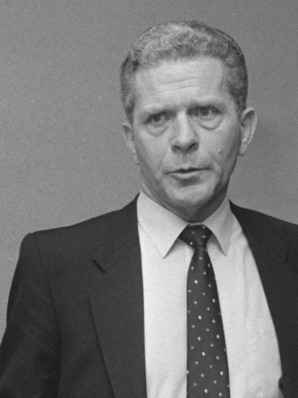 Persconferentie n.a.v. de schietpartij in Rotterdam waarbij agent gedood en een zwaar gewond werd; Peper, Van Dop en Spruit